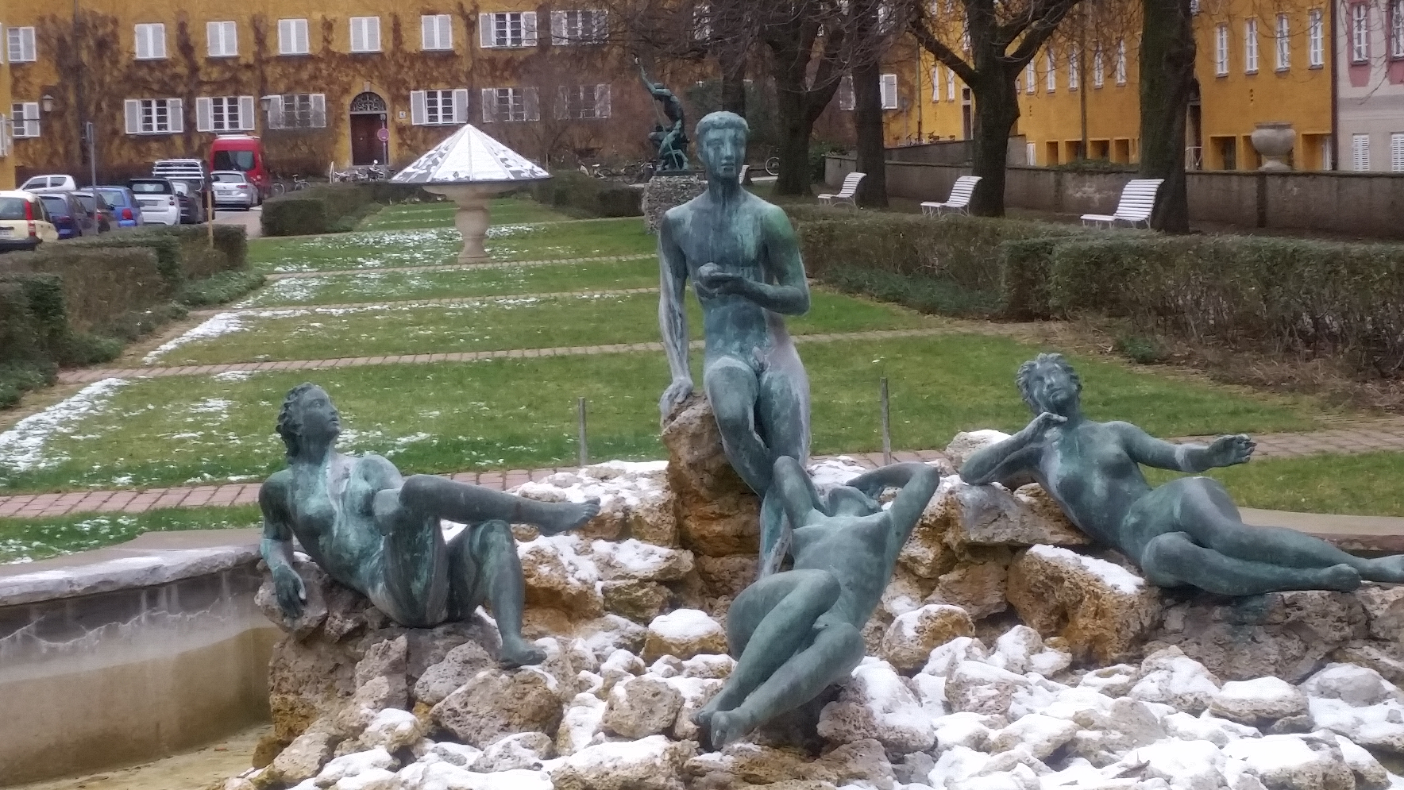 Brunnen mit Paris, umgeben von den grazilen Bronze-Göttinnen Hera, Pallas Athene und Aphrodite. 1960, Entwurf Senator Borst, Bildhauer Prof. Jakob Wilhelm Fehrle in der Hildebrandstraße.